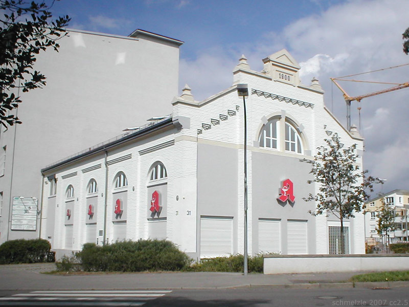 Letztes noch erhaltenes ehemaliges Gebäude der Zwirnerei Ackermann in Heilbronn-Sontheim. Heute nach Abriss der restlichen Fabrikanlagen und Sanierung als "Apotheke im Staufenbergzentrum" genutzt.